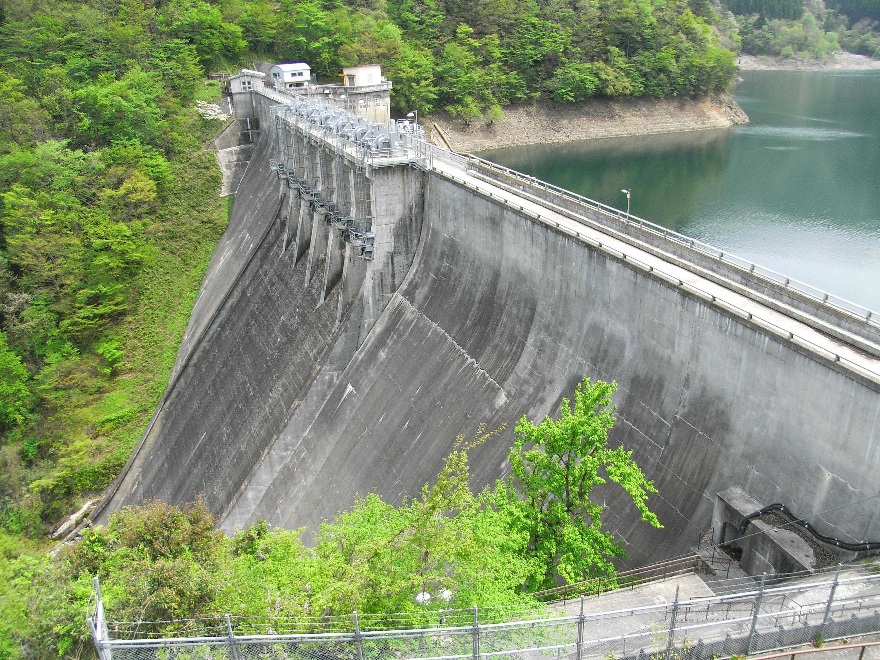 Dam